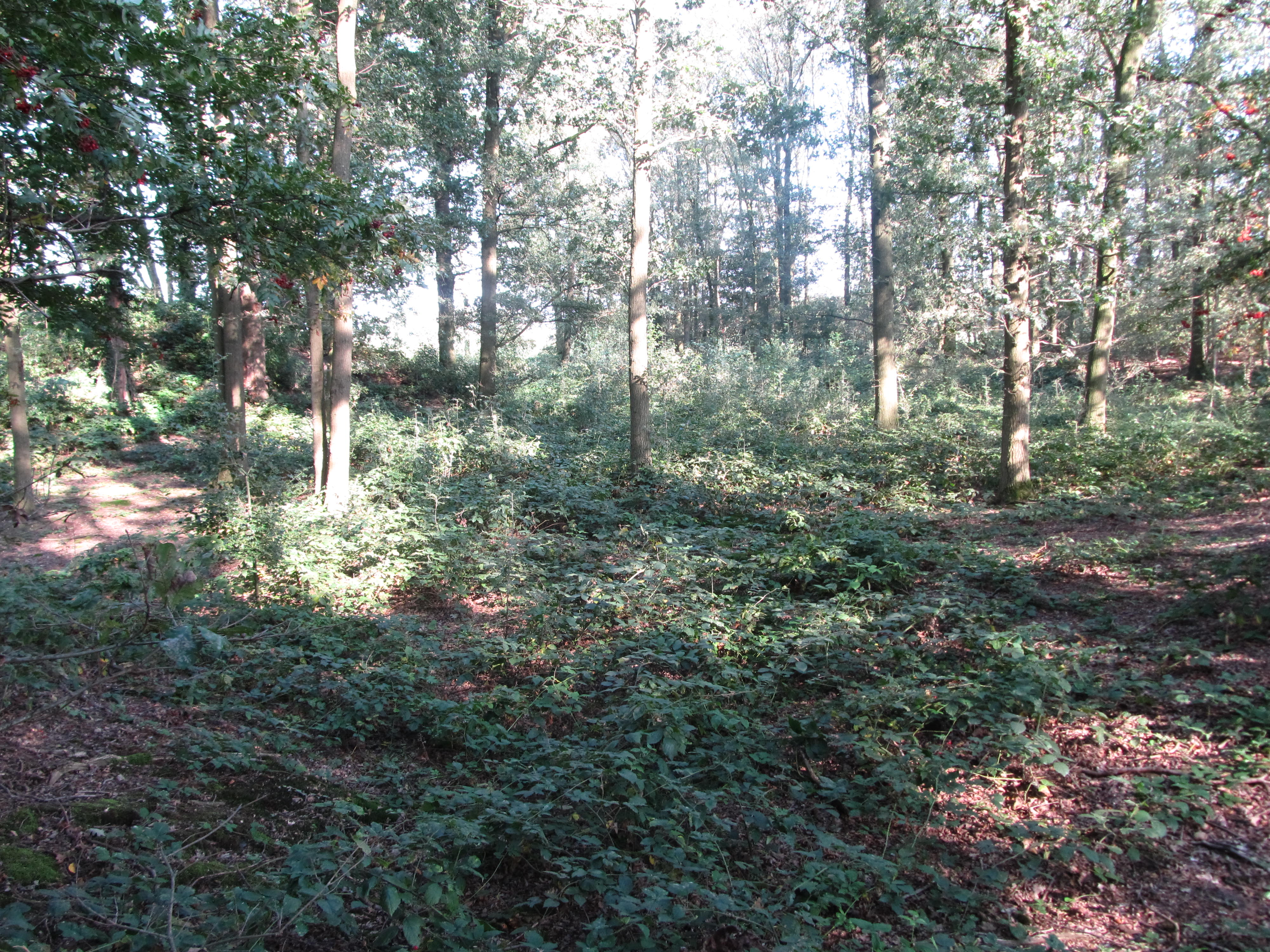 Kasteel Motte